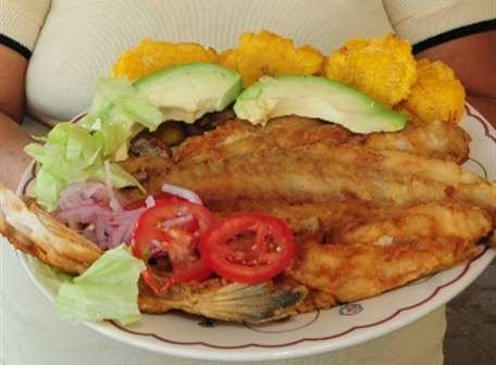 tipico